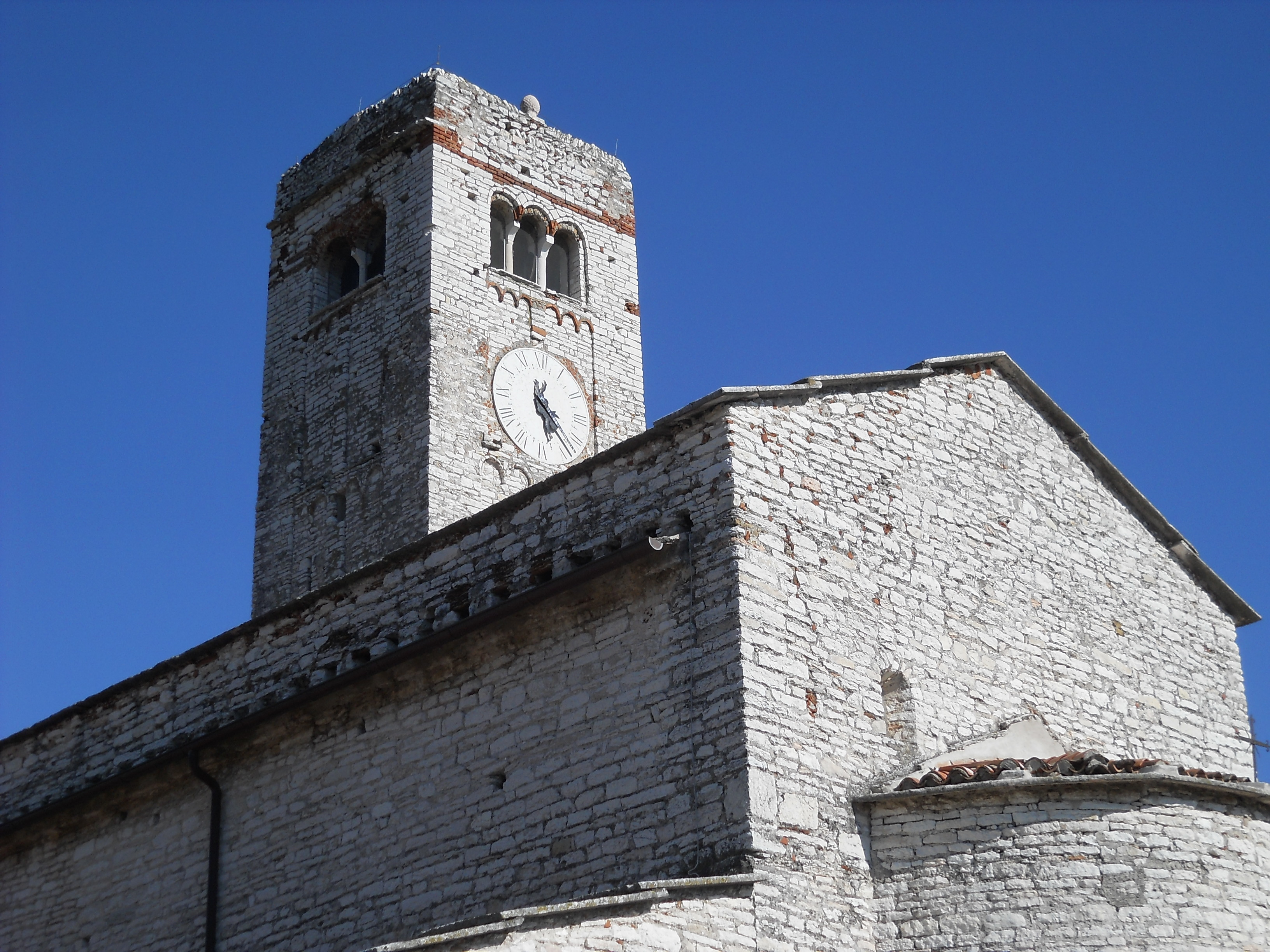 Esterno della Pieve di San Giorgio di Valpolicella